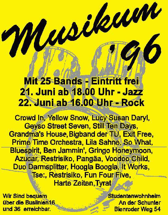 Abbildung des Posters für das Musikum 1996